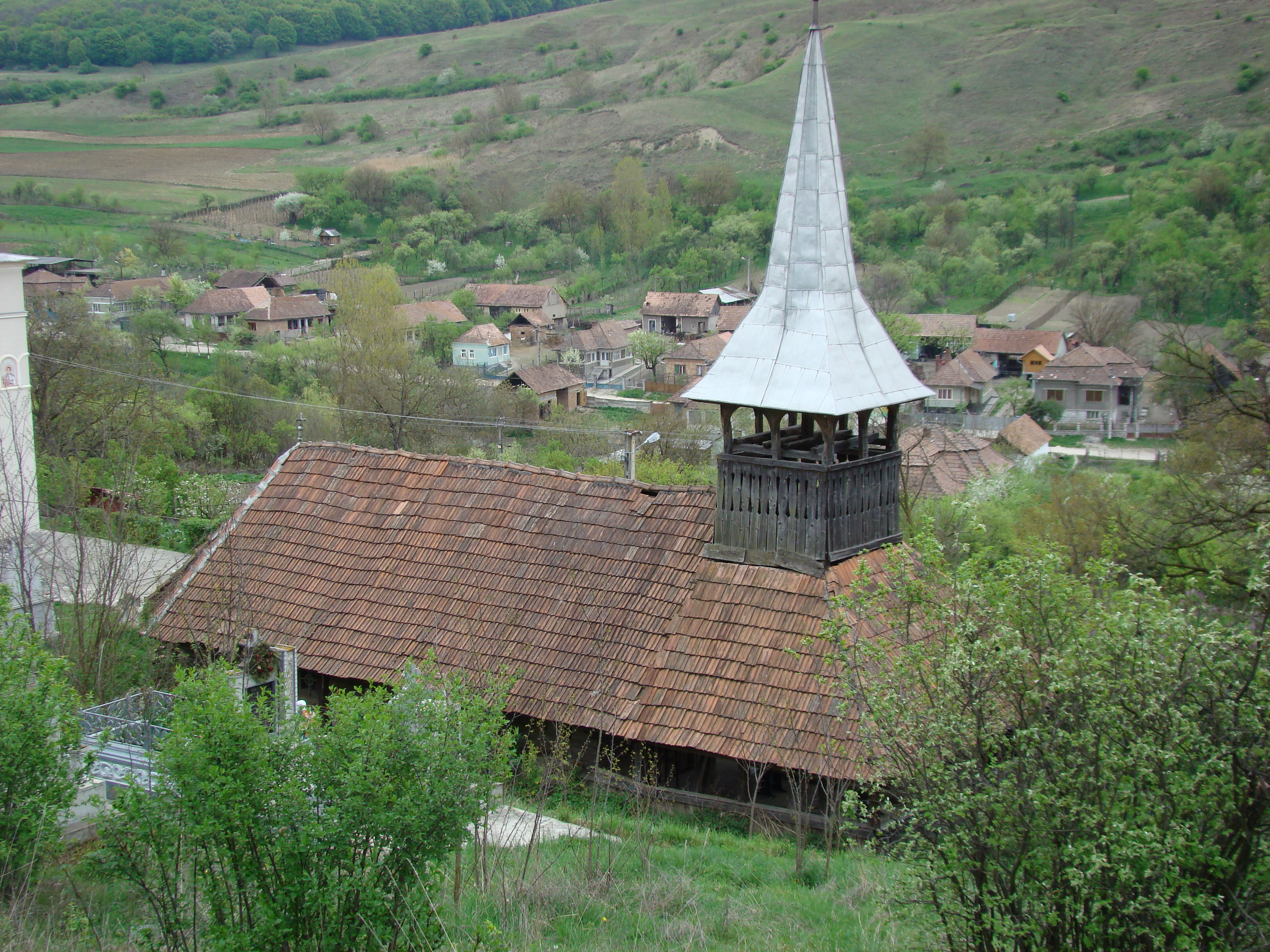 Biserica de lemn din Băgău, judeţul Alba.